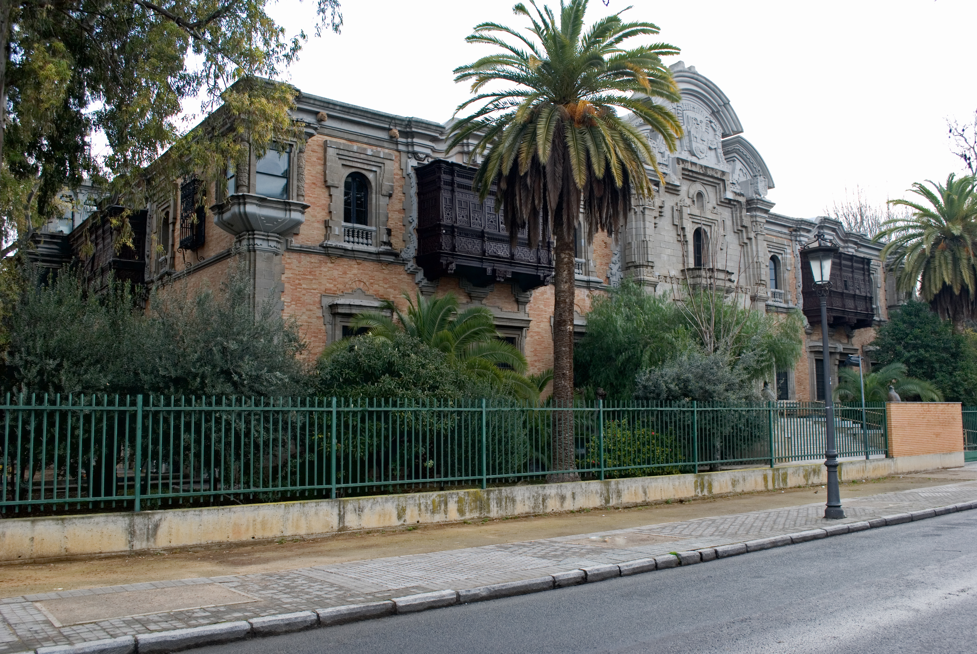 Pabellón de Perú de la Exposición iberoamericana de 1929 en Sevilla